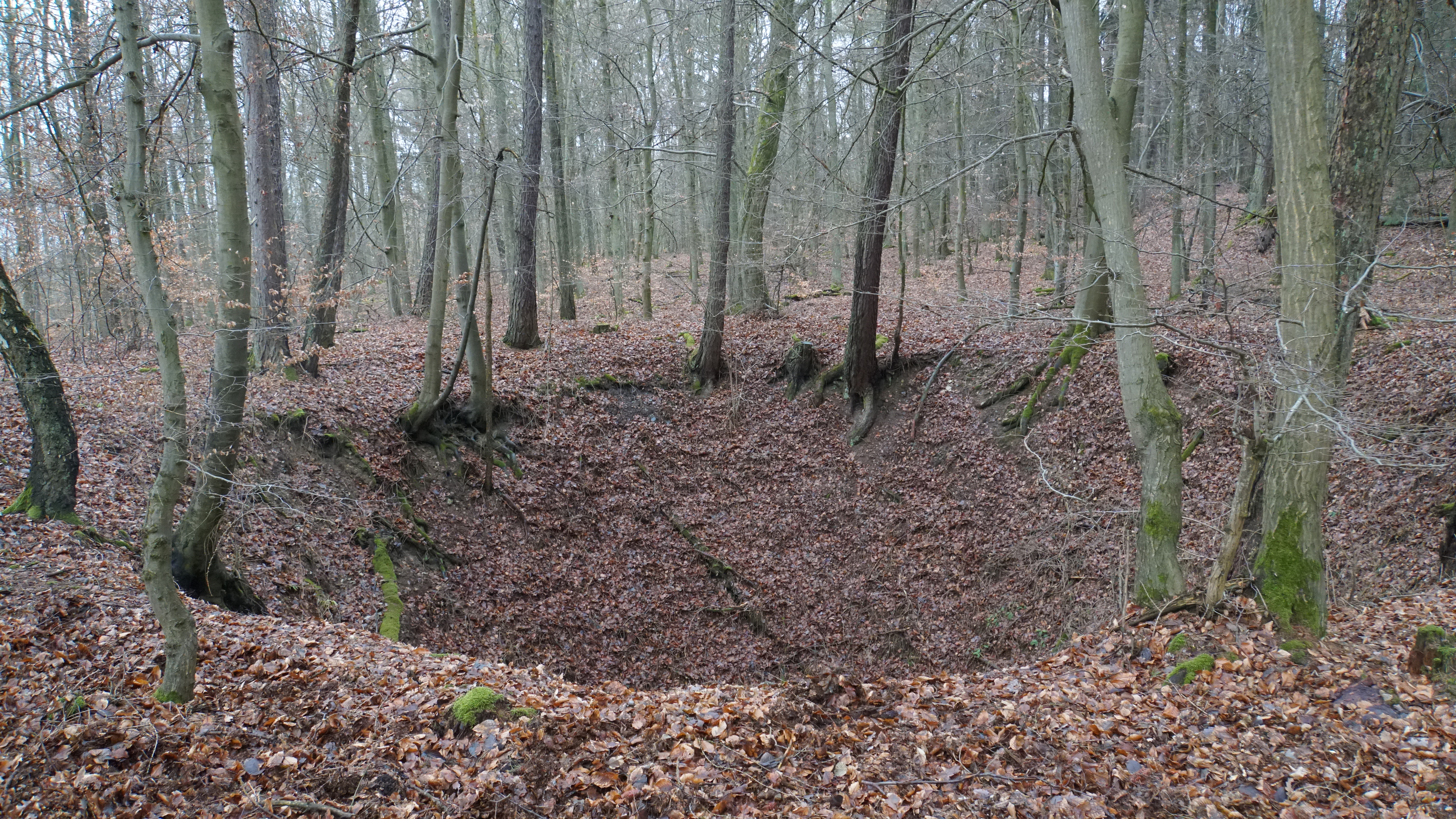 Grube Silbersegen bei Espa im Taunus. Pinge des Gerichtschachts, Durchmesser ca. 20m, Tiefe ca. 9m.